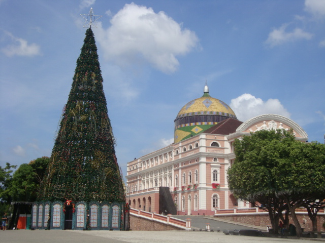 Árvore de Natal em Manaus, capital do Estado do Amazonas, Brasil.